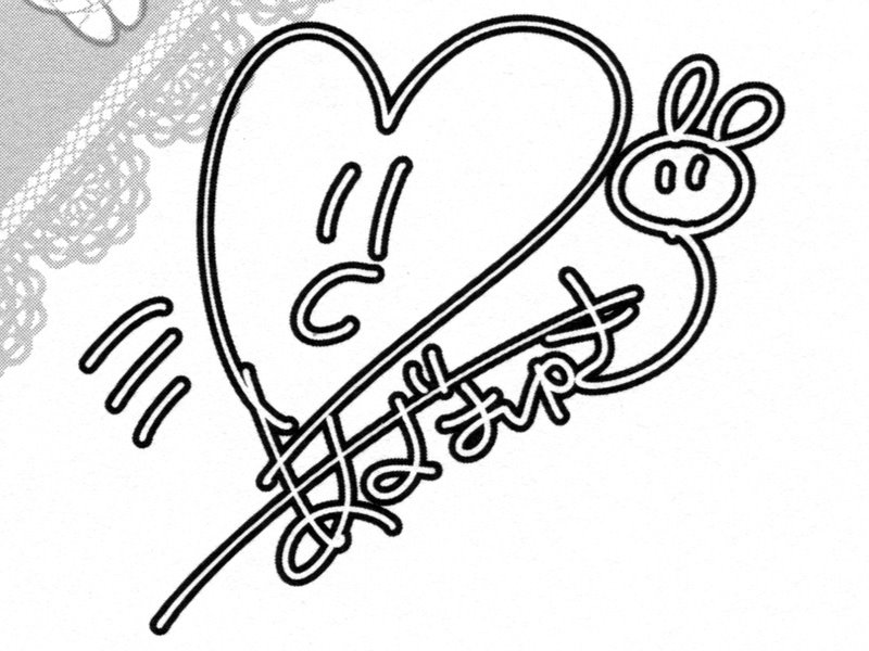 日本女性漫畫家及插畫家東由希的簽名。